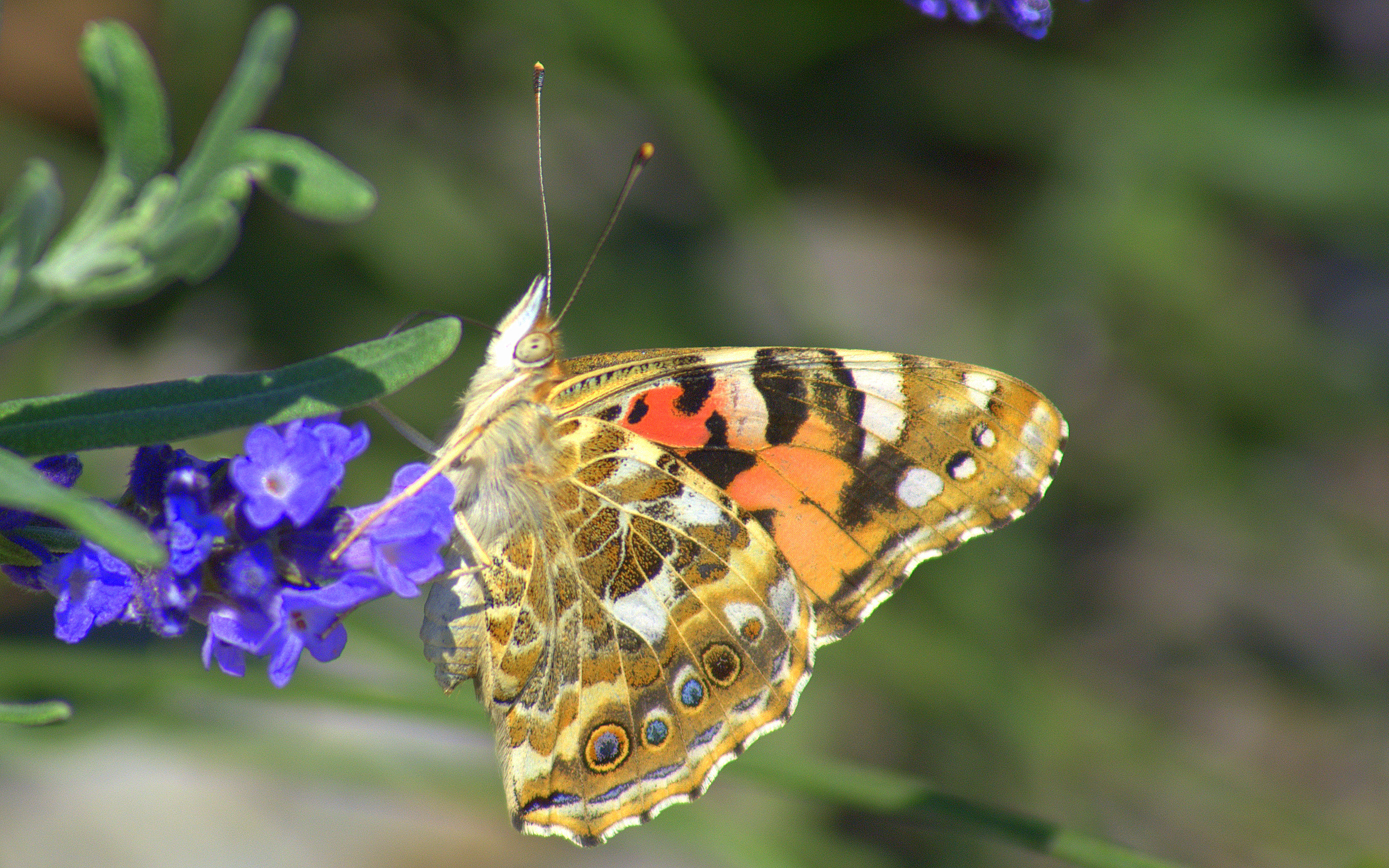 Bogáncslepke Fotó: Dubovánszky Zsolt Hungary, Vecsés, 2009. July